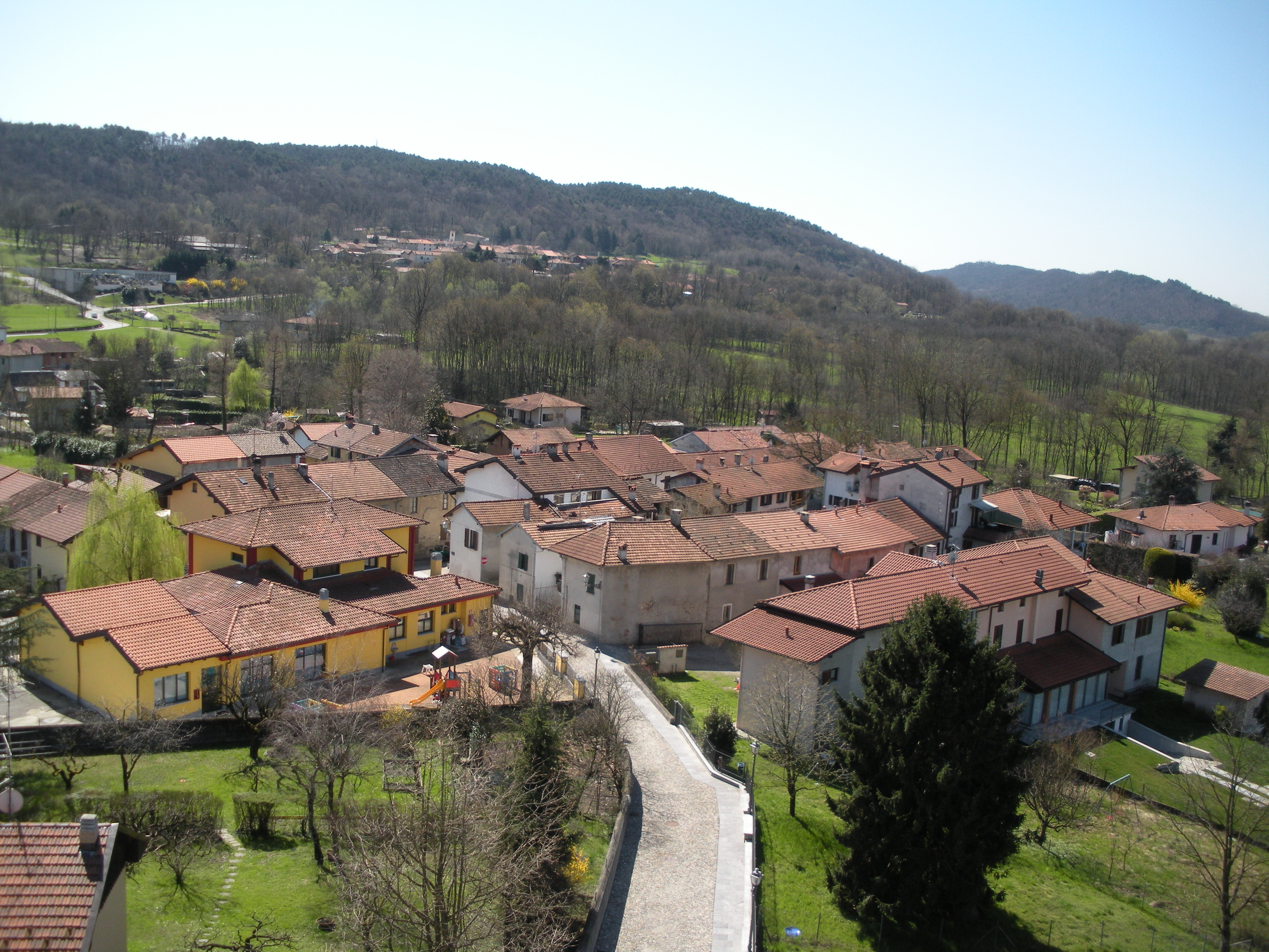 Veduta dal campanile di Inarzo